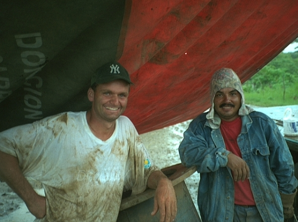 Toni Rüttimann col compagno Walter Yánez.